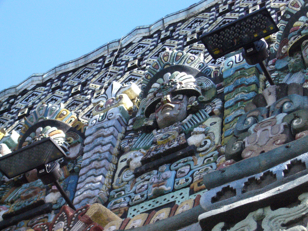 Mayan